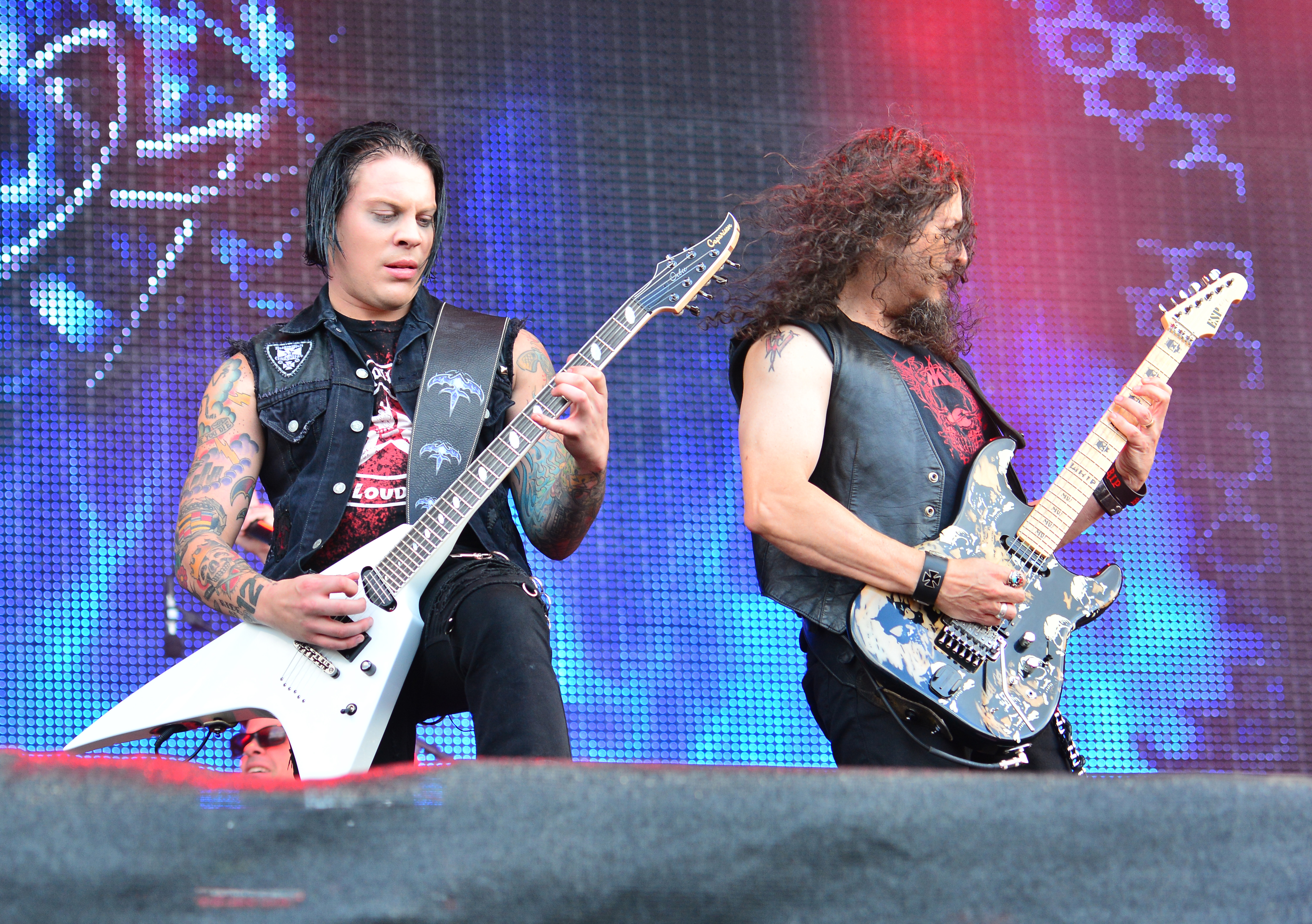 Queensryche bein Wacken Open Air 2015